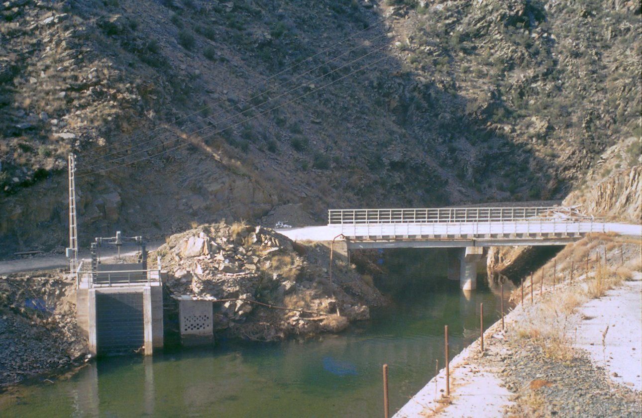 Compuerta de inicio del canal del Sorbe junto al arroyo de Almiruete